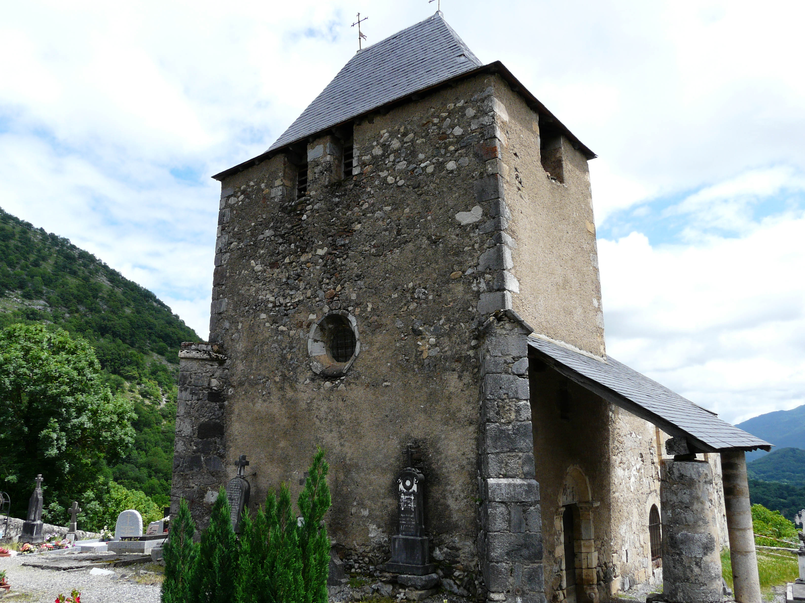 L'église Saint-Martin d'Ourde, Hautes-Pyrénées, France.